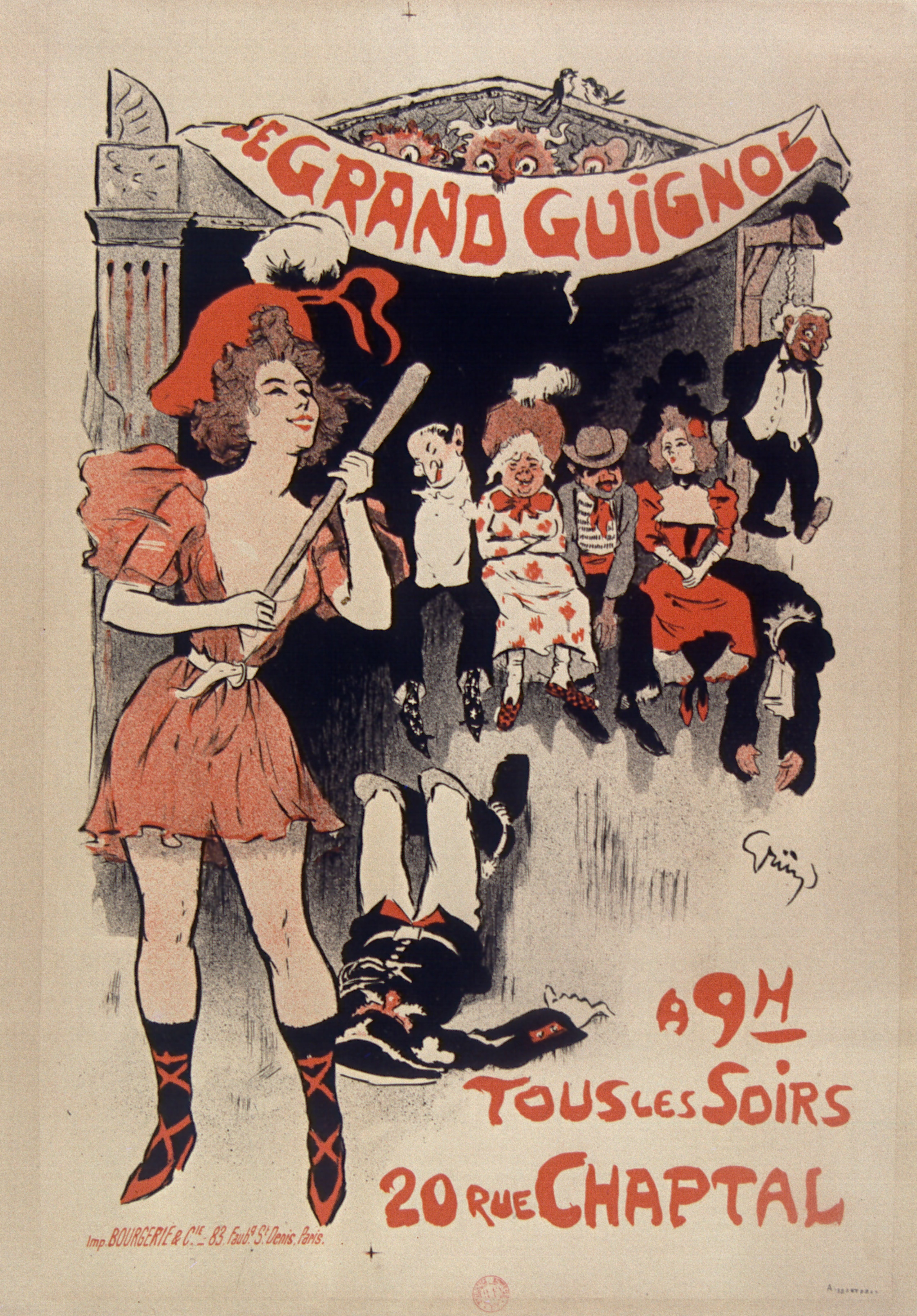 Affiche "Le Grand Guignol à 9h tous les soirs 20 rue Chaptal".